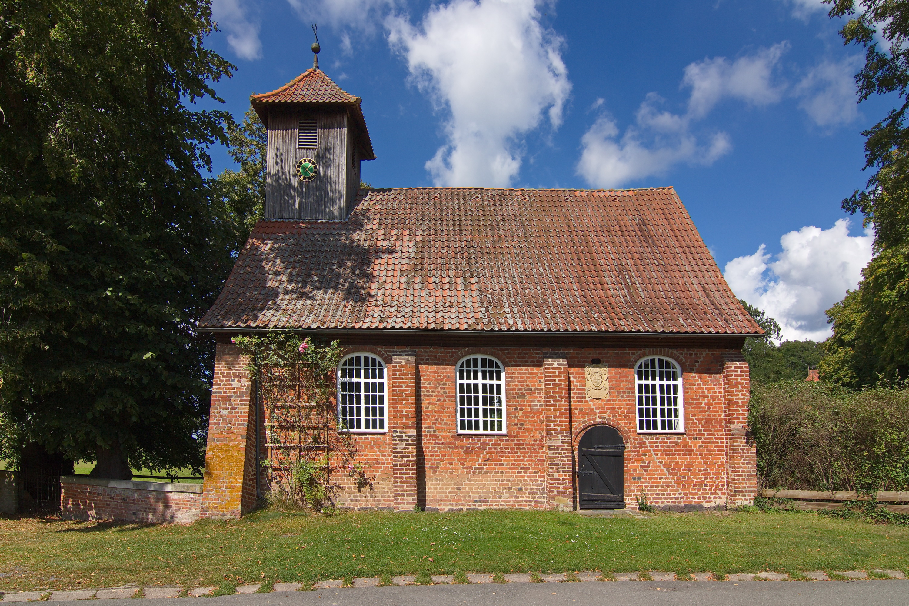 Gutskapelle St. Matthaei in Bothmer (Schwarmstedt), Niedersachsen, Deutschland